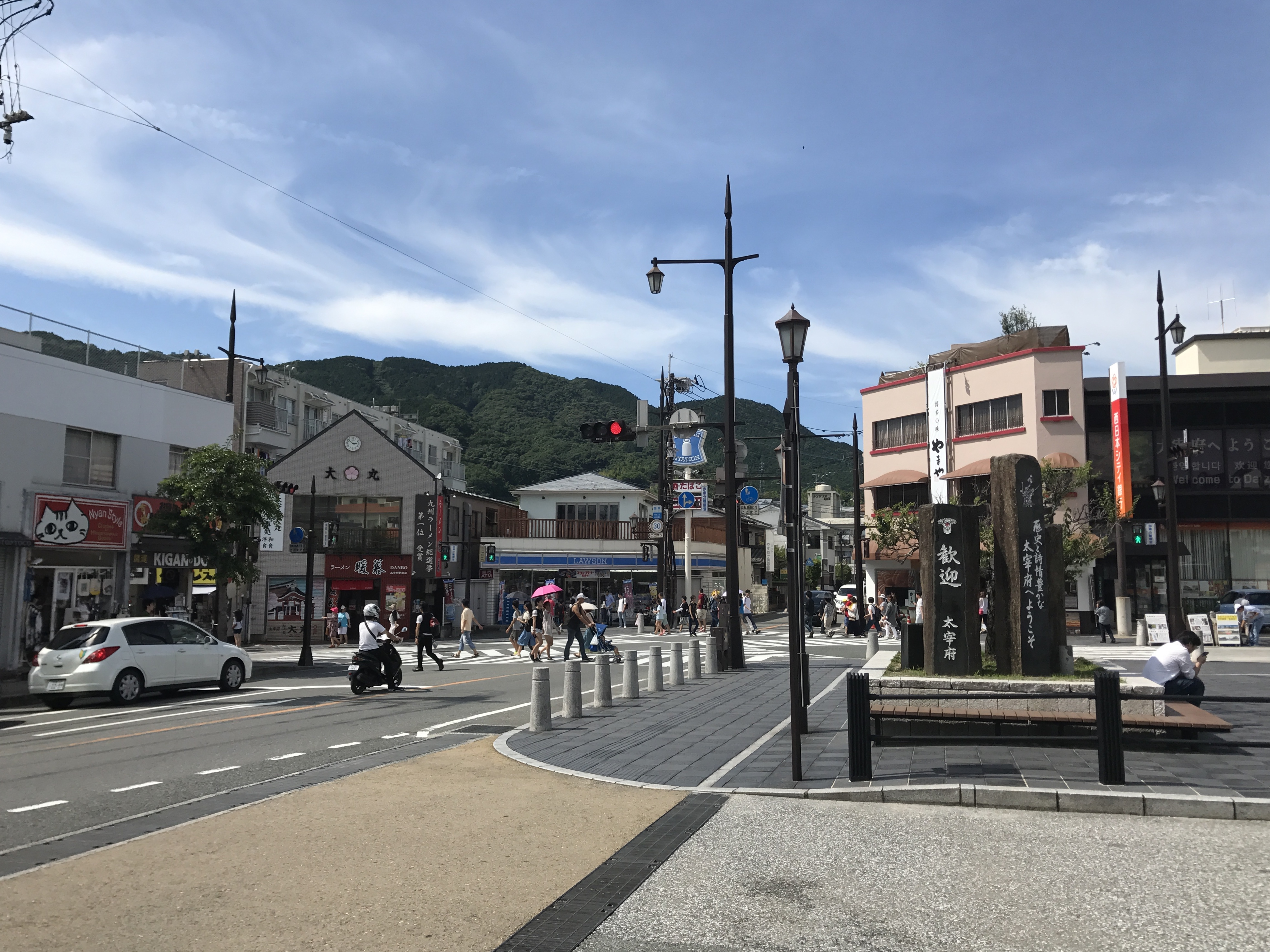 太宰府駅の駅前風景